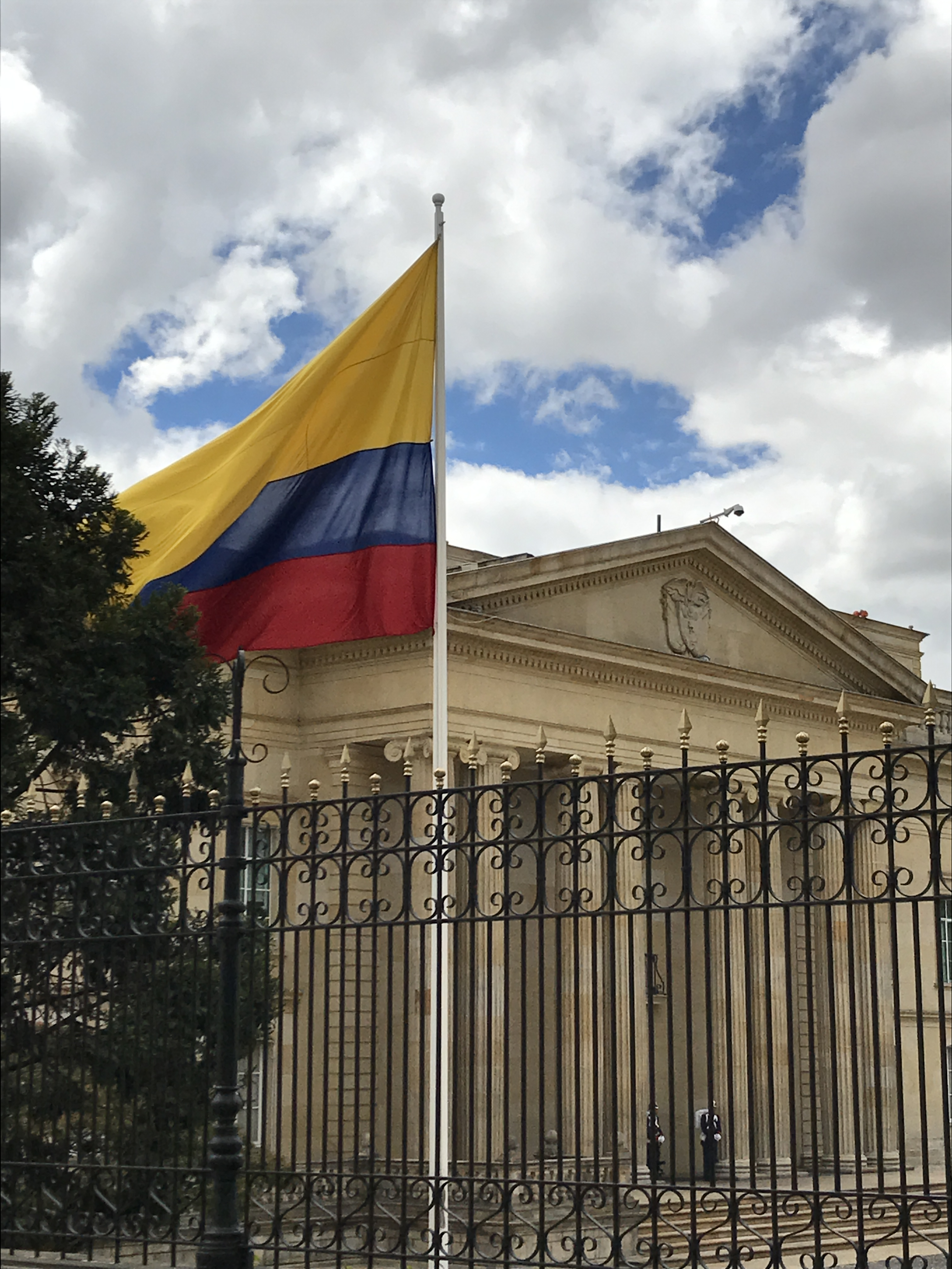 Palacio de Nariño